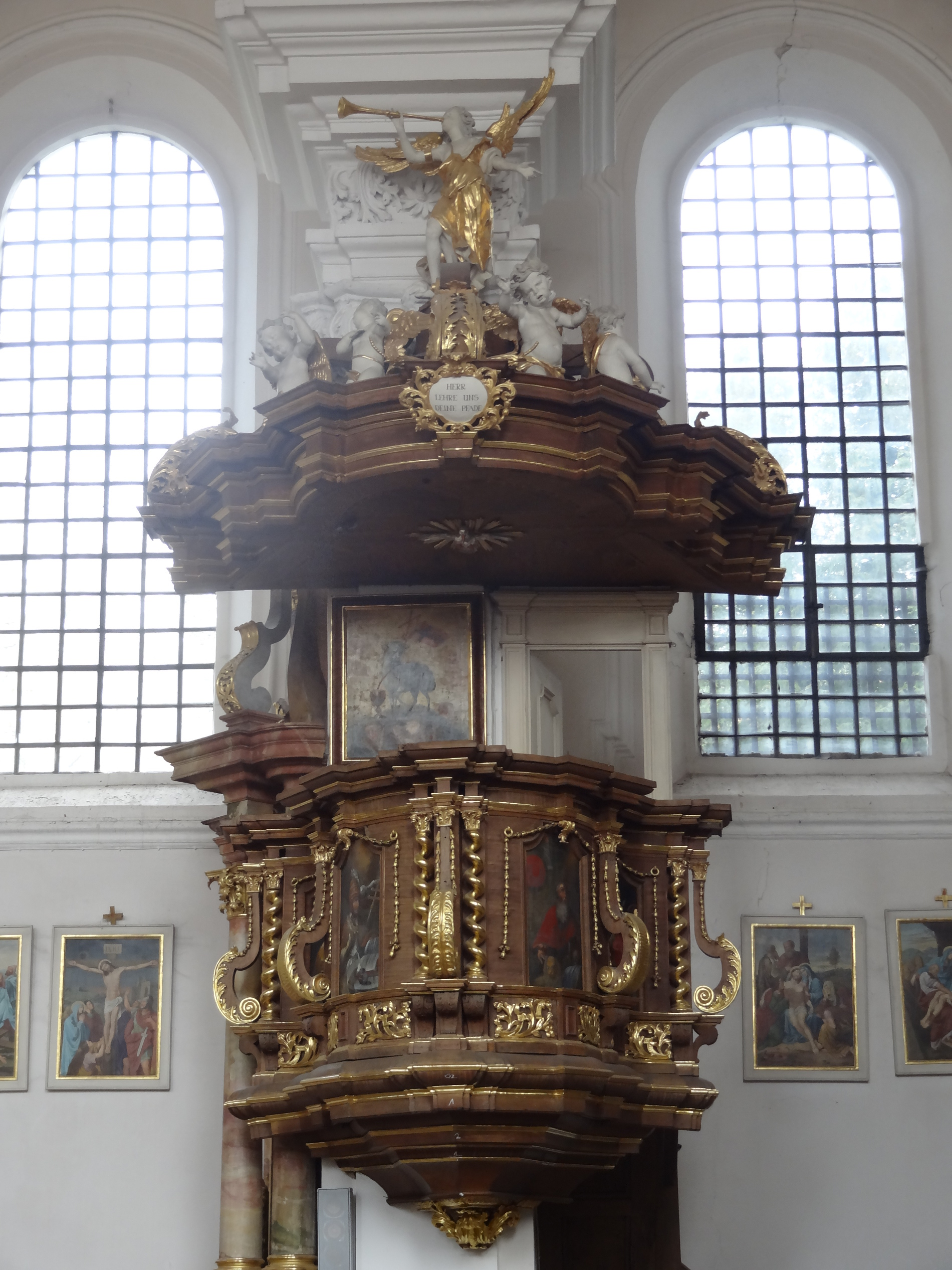 Barocke Kanzel (1721) der Wallfahrtskirche Mariä Himmelfahrt in Haindling (Gde. Geiselhöring, Lkr. Straubing-Bogen)